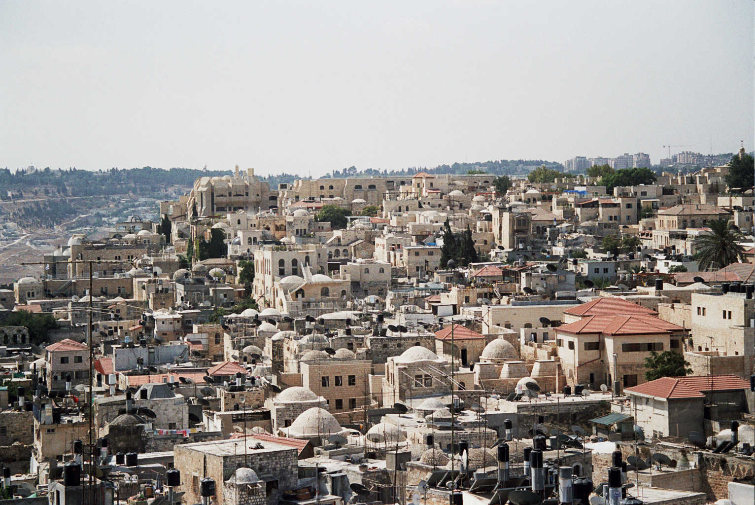 העיר העתיקה בירושלים (בערבית: بلدة القدس القديمة, נהגה: בִּלִדַת אֶלקוּדְס אֶלקָדִימָה) היא האזור העירוני העתיק של ירושלים. שטחה המוקף על ידי חומות ירושלים הוא כ-850 דונם.כמו כן נכללים בעיר העתיקה הר ציון ועיר דוד, הנמצאים מחוץ לחומות, בסמוך ומצד דרום. העיר העתיקה מהווה מוקד משיכה מרכזי לתיירים בני דתות ואומות שונות, אשר באים מרחבי העולם לבקר את האתרים הקדושים הנמצאים בה, ובהם: הר הבית, הכותל המערבי וכנסיית הקבר.